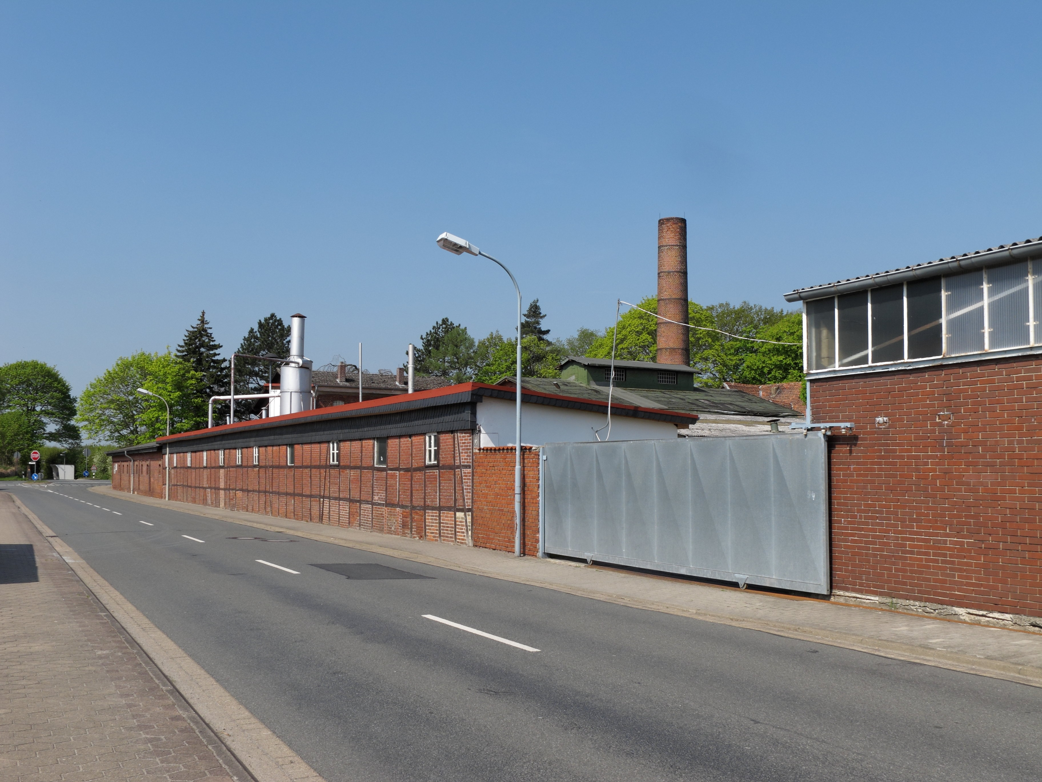 Wendeburg Ersehof, Ostpreußenstraße. Im Hintergrund erkennbar: Firmengelände einer Haar- und Borstenzurichterei.